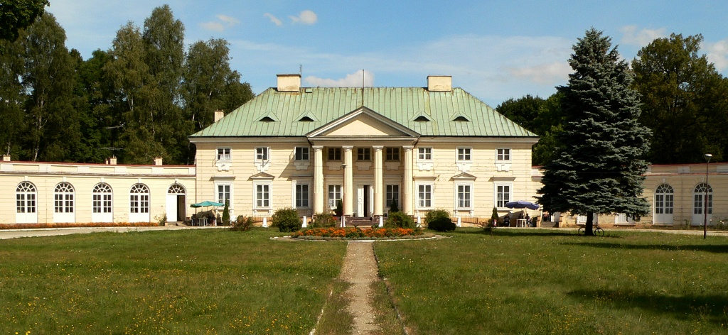 Description: Małachowski's palace in Białaczów, Powiat of Opoczno, Poland Opis: Klasycystyczny pałac Małachowskich w Białaczowie, powiat opoczyński Source: Picture taken (september 2005) and uploaded by Marek K. Misztal